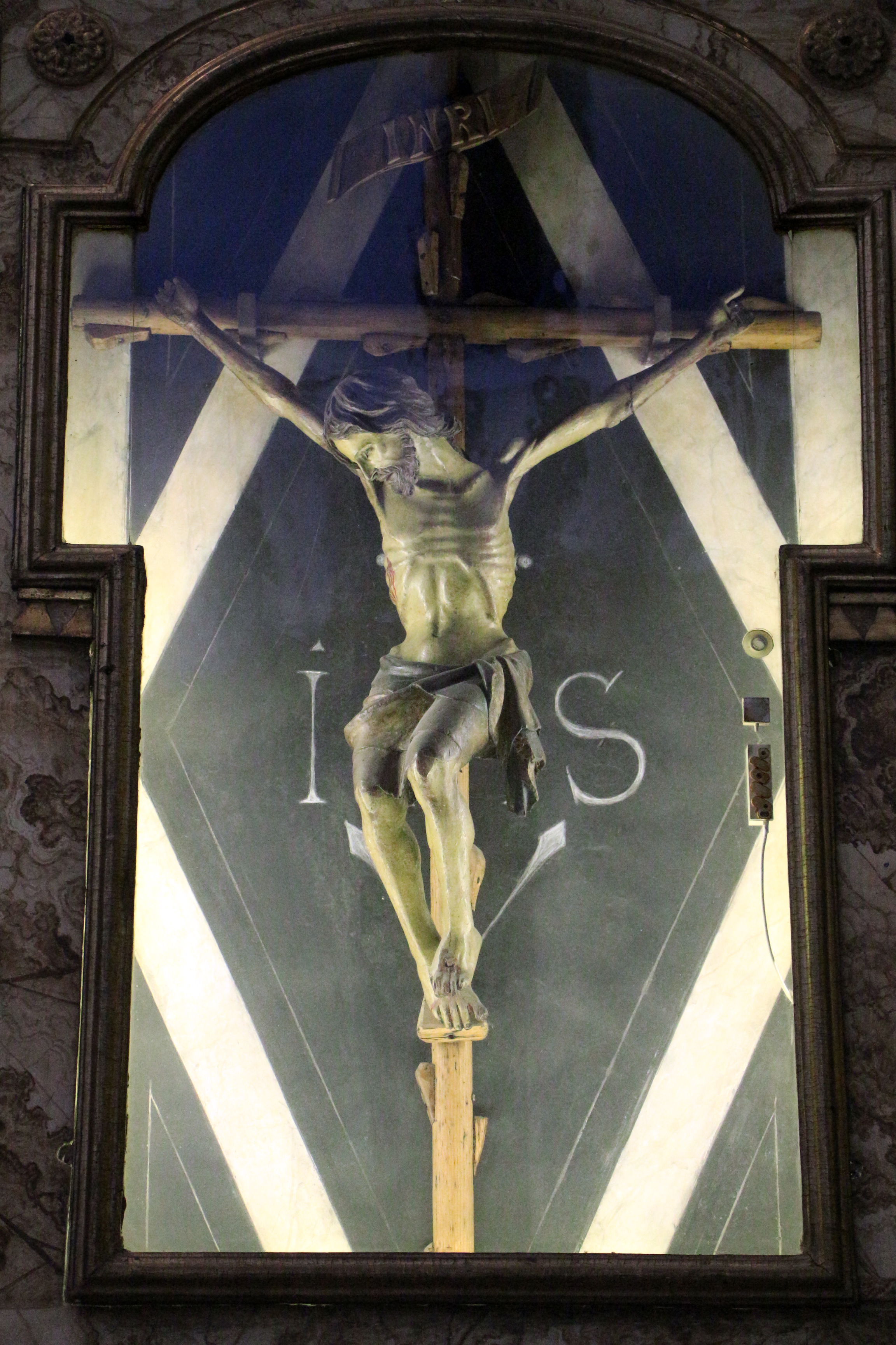 per processione